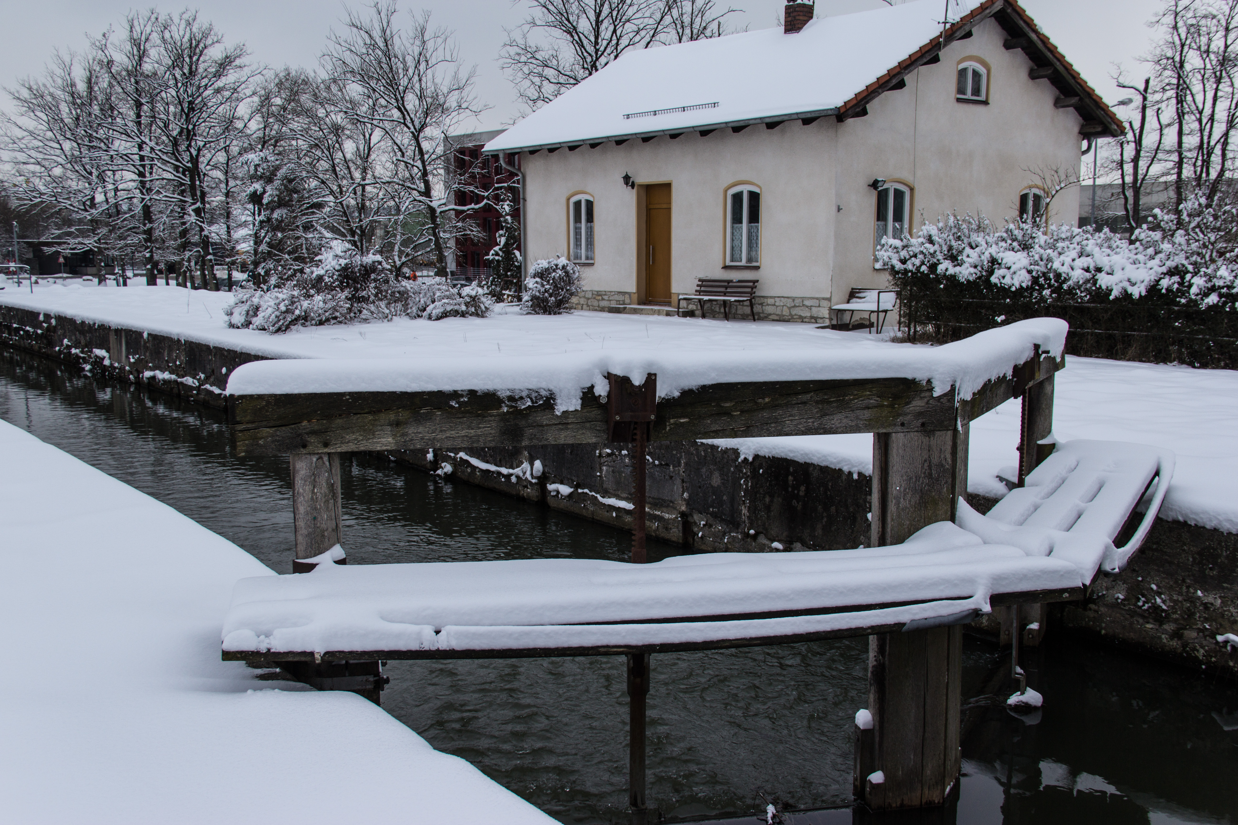 Schleuse 32, Bestandteil des Ludwig-Donau-Main-Kanals, Kammerschleuse, Sandstein, 1836-45; Schleusenwärterhaus, eingeschossiger Massivbau mit Flachsatteldach, 1836-45